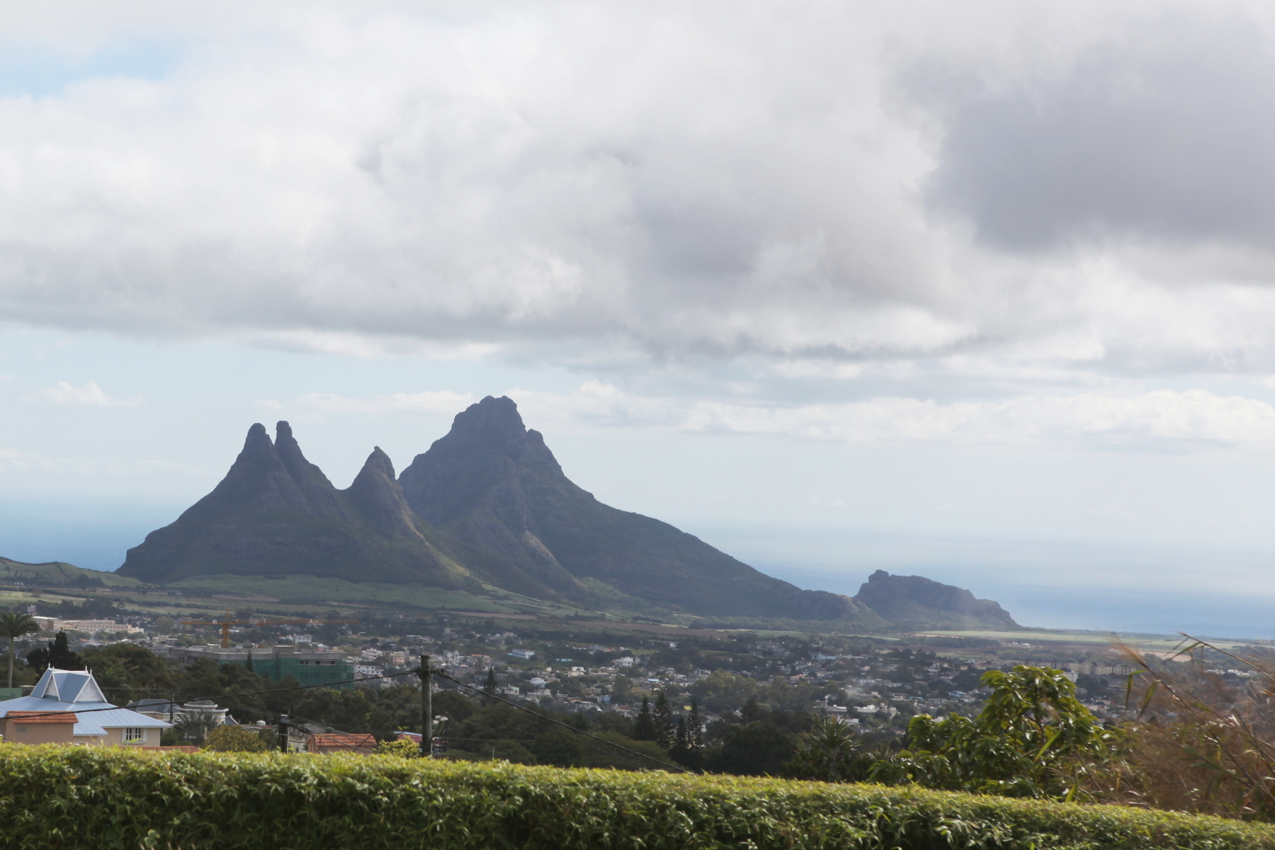 photo prise depuis Curepipe